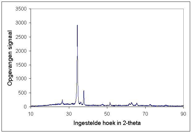 Dit röntgendiffractiepatroon is van ZnO, opgenomen door mijzelf in 2001. Ik geef het bij deze vrij. Ter verduidelijking: het patroon dat je hier ziet is als het ware een vingerafdruk van de stof ZnO. Met deze vingerafdruk valt te achterhalen dat dit ZnO is, en niet toevallig een ander stofje. Het is trouwens goed mogelijk dat dit plaatje hoort bij het sem-plaatje van ZnO. Ik kan dat echter helaas niet meer goed achterhalen.